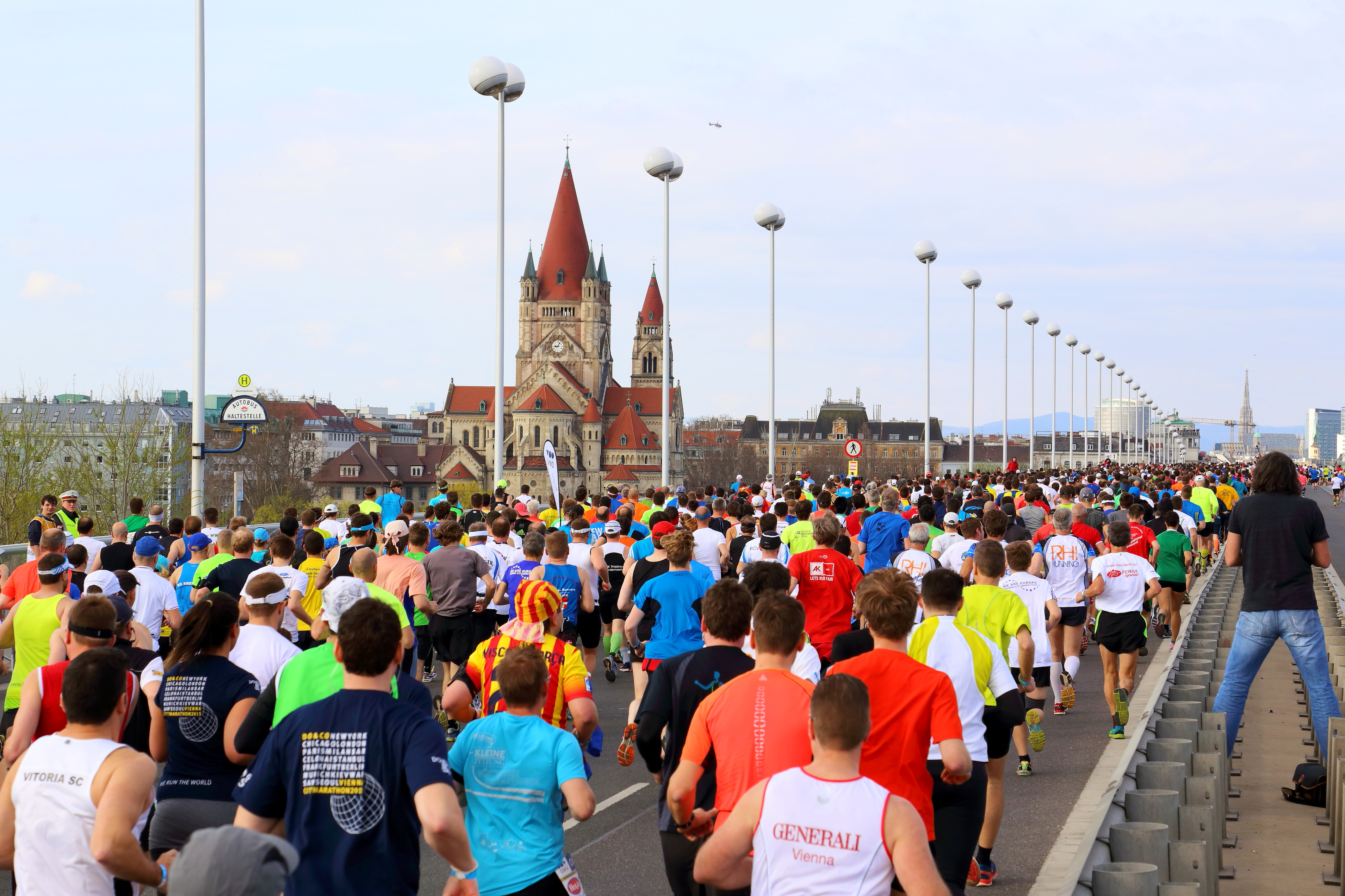 Läufer des 32. Vienna City Marathon im Bereich Reichsbrücke mit der Mexikokirche im Hintergrund. Insgesamt gab es 42.742 Anmeldungen aus 129 Nationen (Marathon 9.064, OMV Halbmarathon 16.145, Stadion Center Staffel Marathon 14.576 (=3.644 Teams), Coca-Cola 4.2 1.580, Coca-Cola 2.0 1.377). Sieger wurde der Äthiopier Sisay Lemma mit einer Zeit von 2:07:31 Stunden.